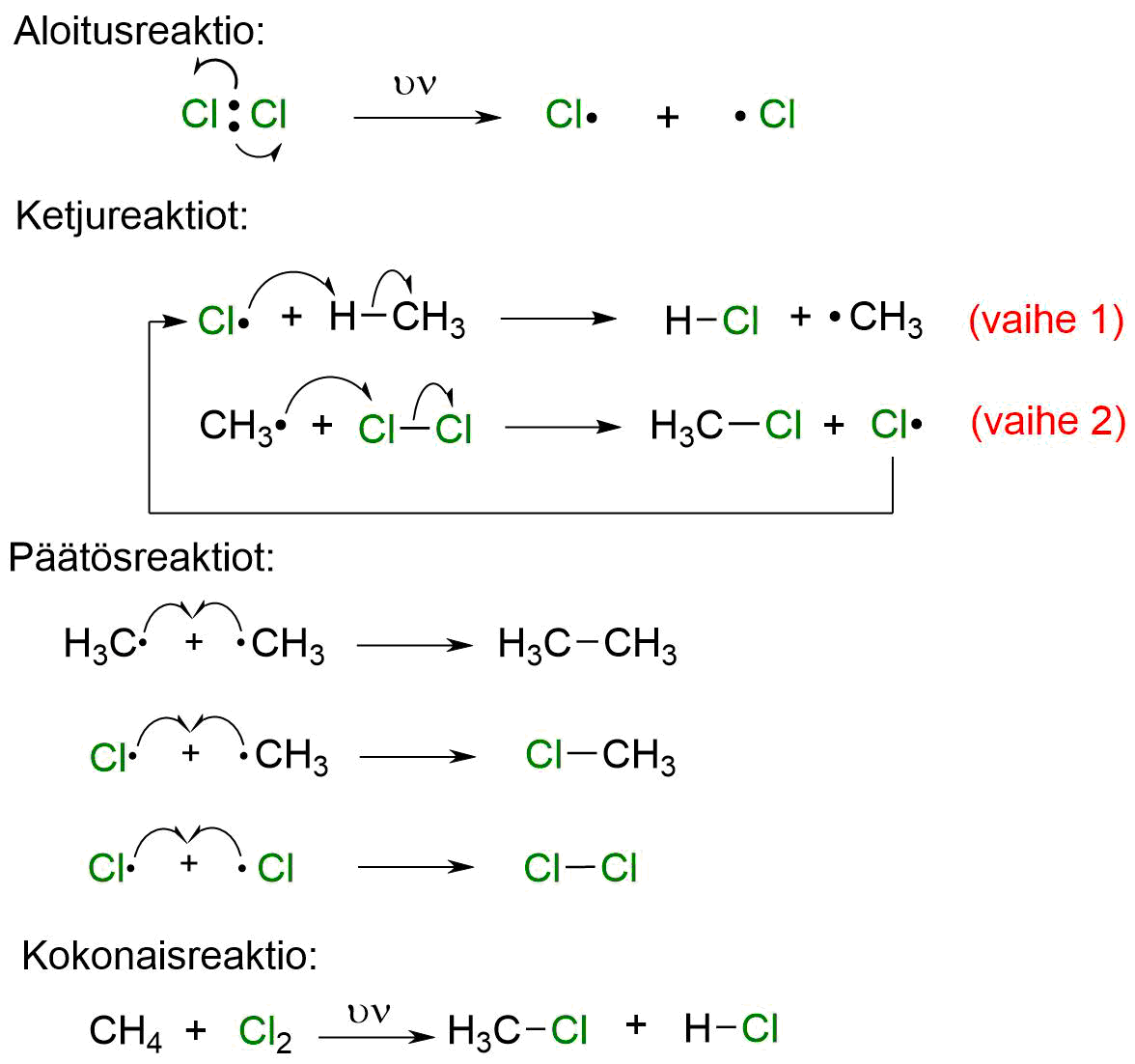 Metaanin kloorauksen aloitus-, ketjureaktio- ja päätösreaktiot.